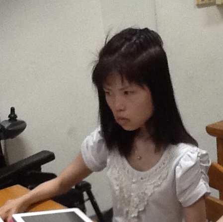 台灣畫家黃子綝